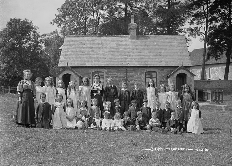 Ffotograffydd/Photographer: P B Abery (1877?-1948) Dyddiad/Date: 1911 Cyfrwng/Medium: Negydd gwydr / Glass negative Maint/Dimensions: 119 x 163 mm. Cyfeiriad/Reference:PBA71/31 Rhif cofnod / Record no.: 4540699 Rhagor o wybodaeth am gasgliad P B Abery yn Llyfrgell Genedlaethol Cymru More information about the P B Abery Collection at the National Library of Wales